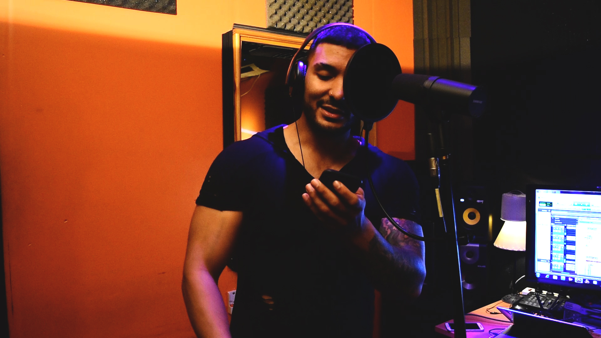 Jengii en el estudio de grabación